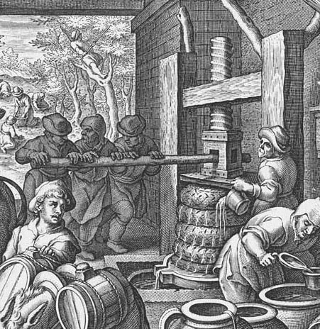 Torchio alla genovese nel XVI secolo: particolare di un disegno di Giovanni Stradano e pubblicato nella raccolta Nova Reperta.